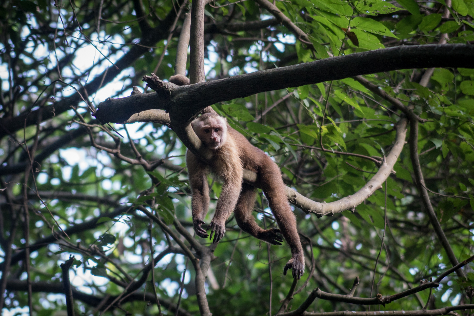 Mono descansa a gran altura, en los arboles del Parque Nacional Natural Tayrona Esta fotografía fue tomada en el municipio colombiano con código 47001.